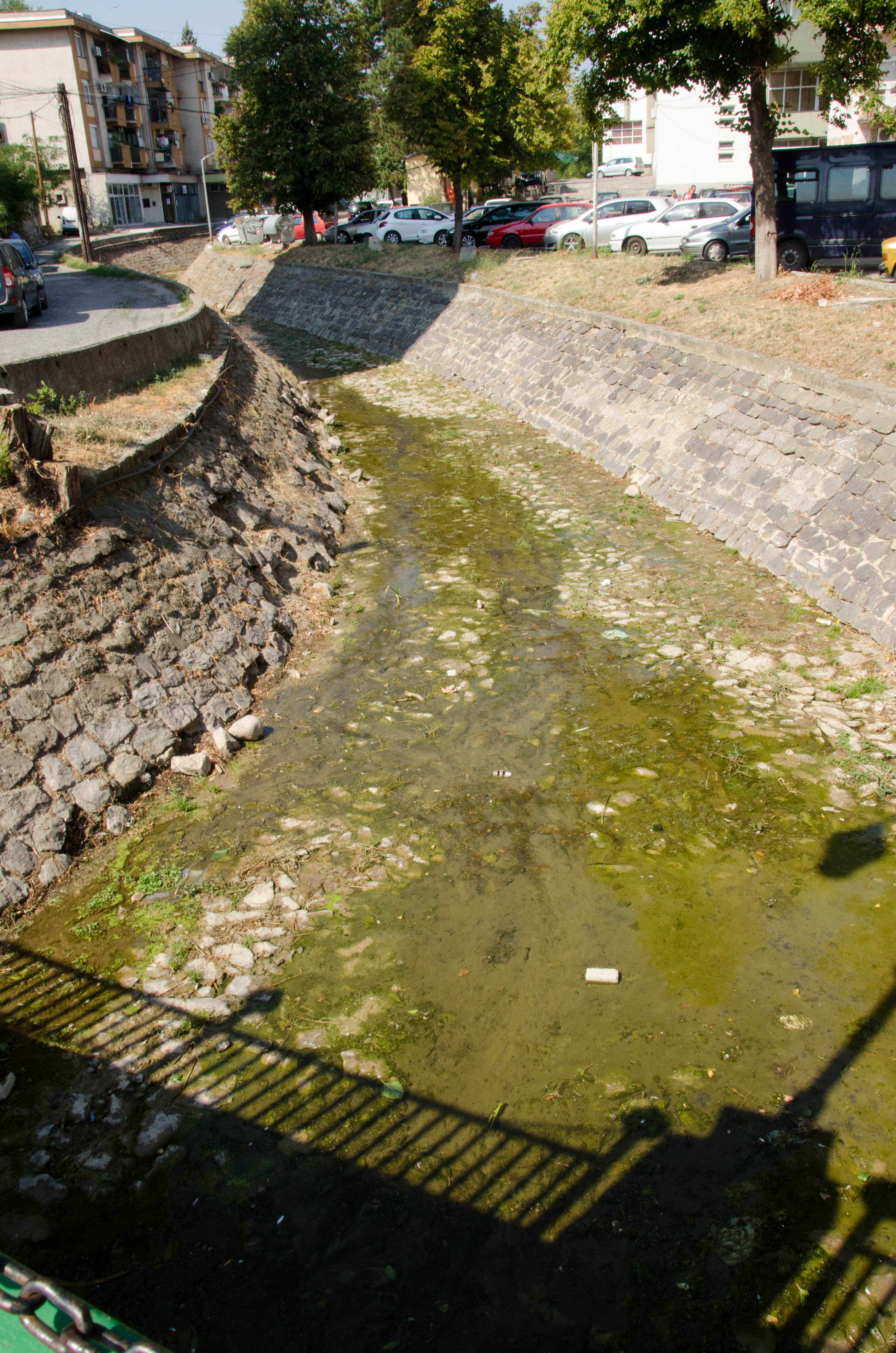 Горобинска Река (Поток) низ Свети Николе.